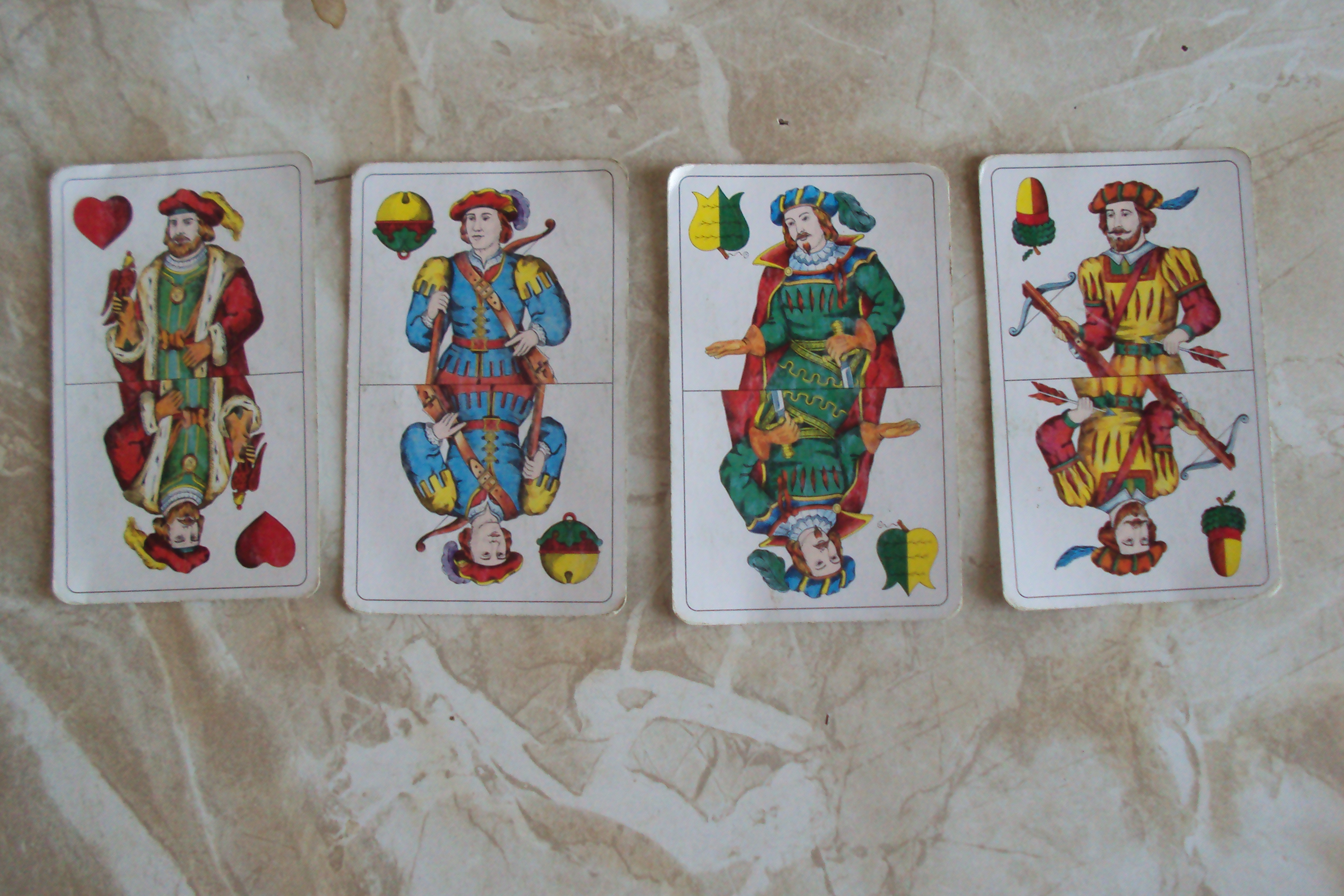 Karetní svršky dlouhlavé